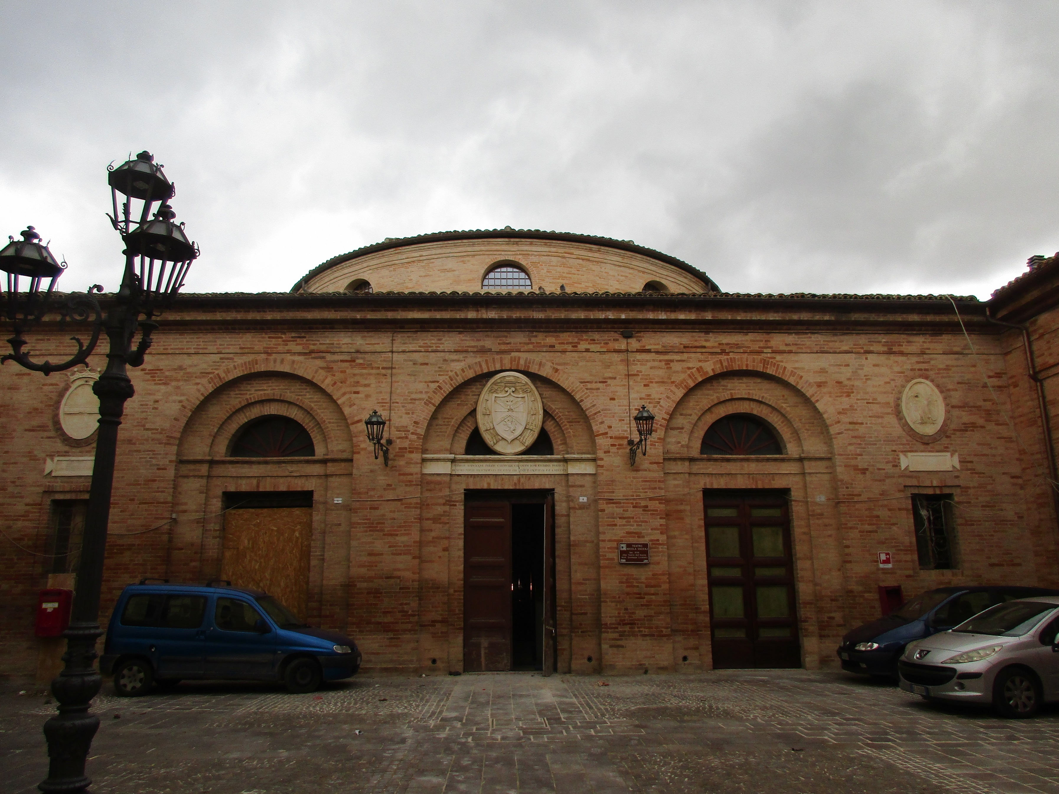 Tolentino: Facciata del Teatro Niccola Vaccaj durante i lavori di restauro (dicembre 2017)